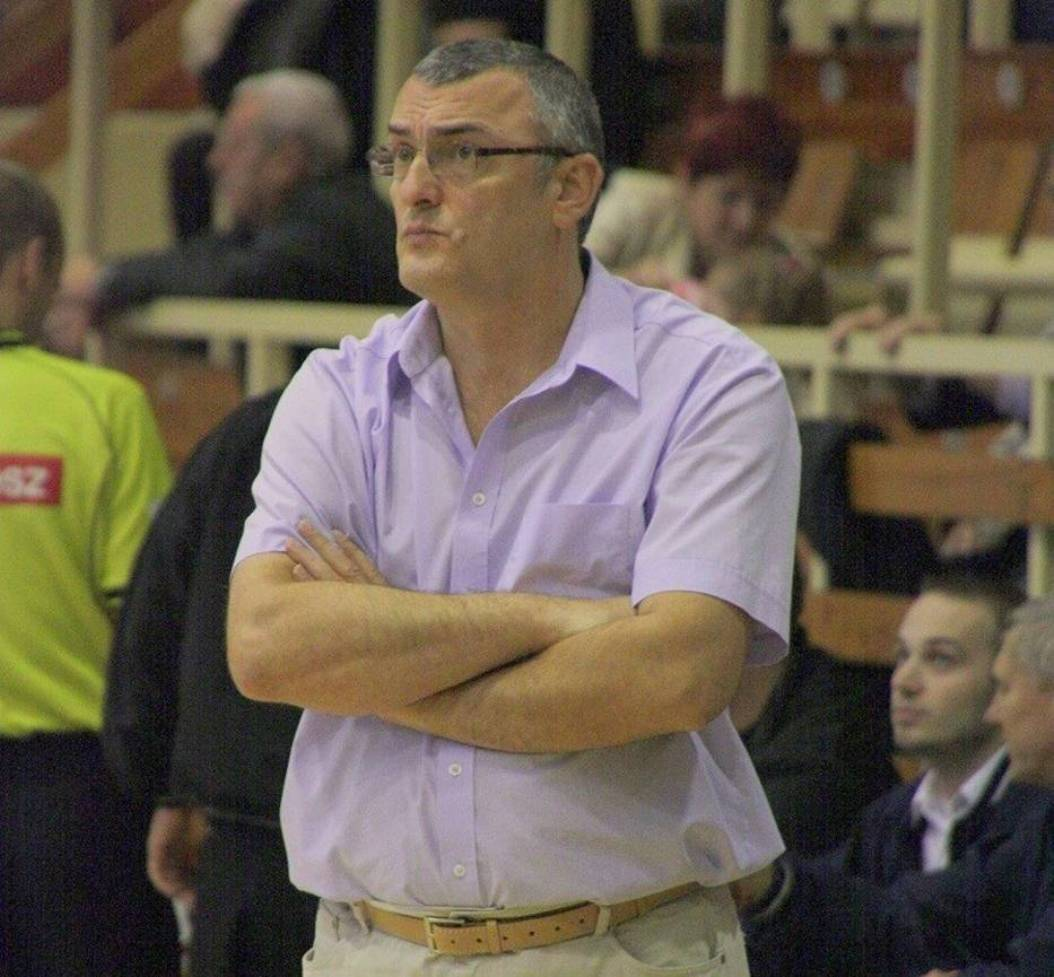 Trener Spójni Grzegorz Chodkiewicz (28.10.2010)